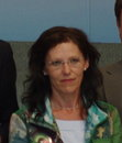 Waltraud Wolff bei einer SPD-Wahlkampfkundgebung auf dem Domplatz in Magdeburg am Donnerstag, dem 3. September 2009